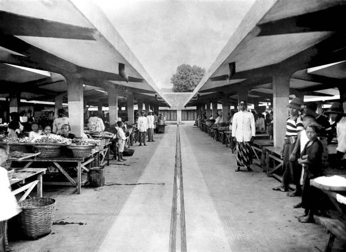 Repronegatief. Markt 'Genteng' te Surabaya, Oost-Java